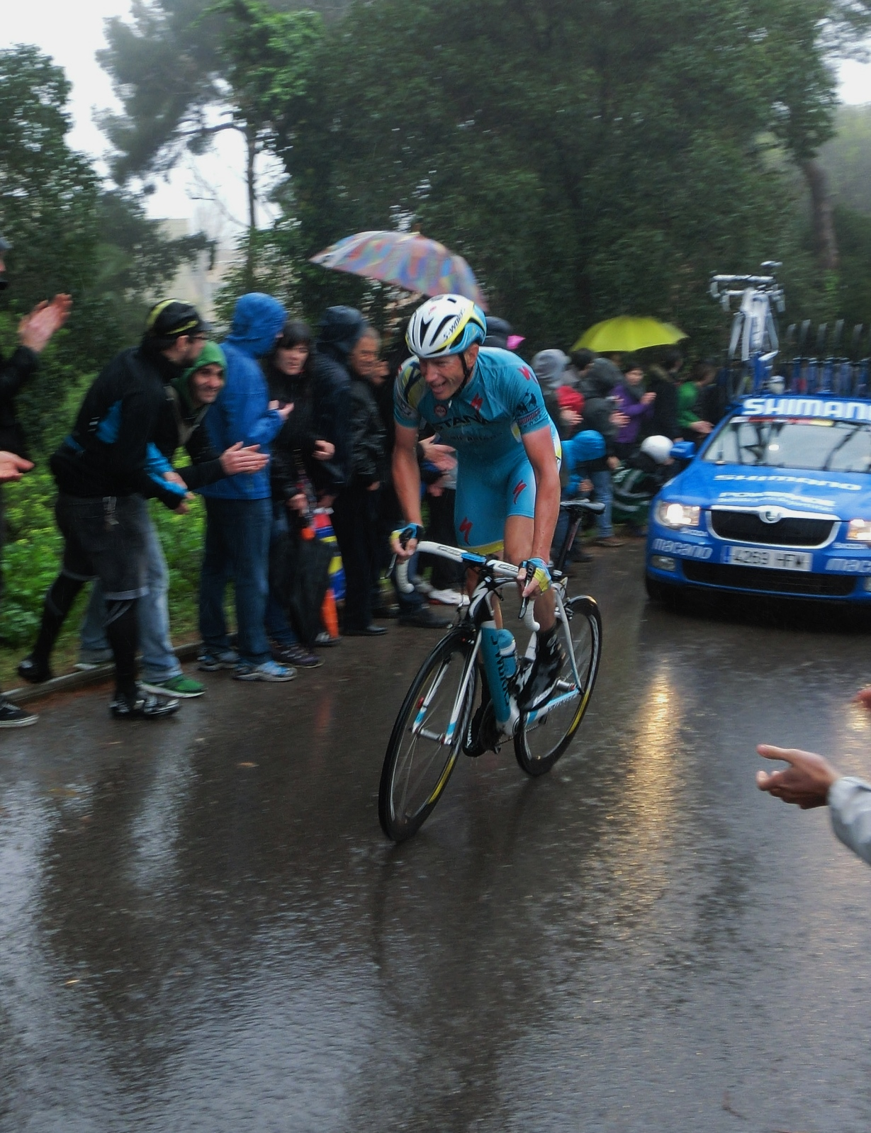 El corredor a Montjuïc (Barcelona, Països Catalans) a la 8a etapa de la Volta Ciclista a Catalunya 2014.